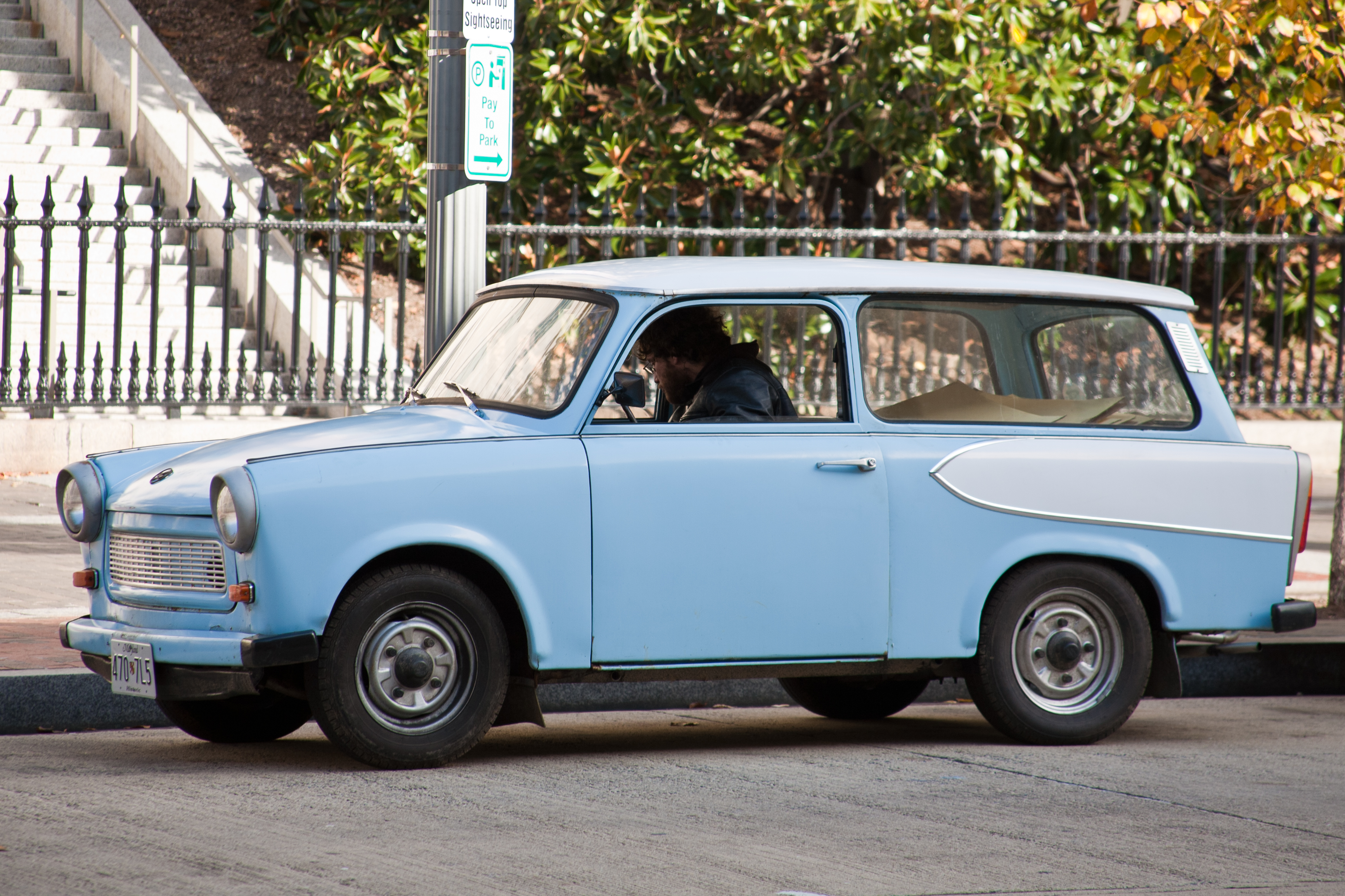 1979 Trabant P601 Kombi.